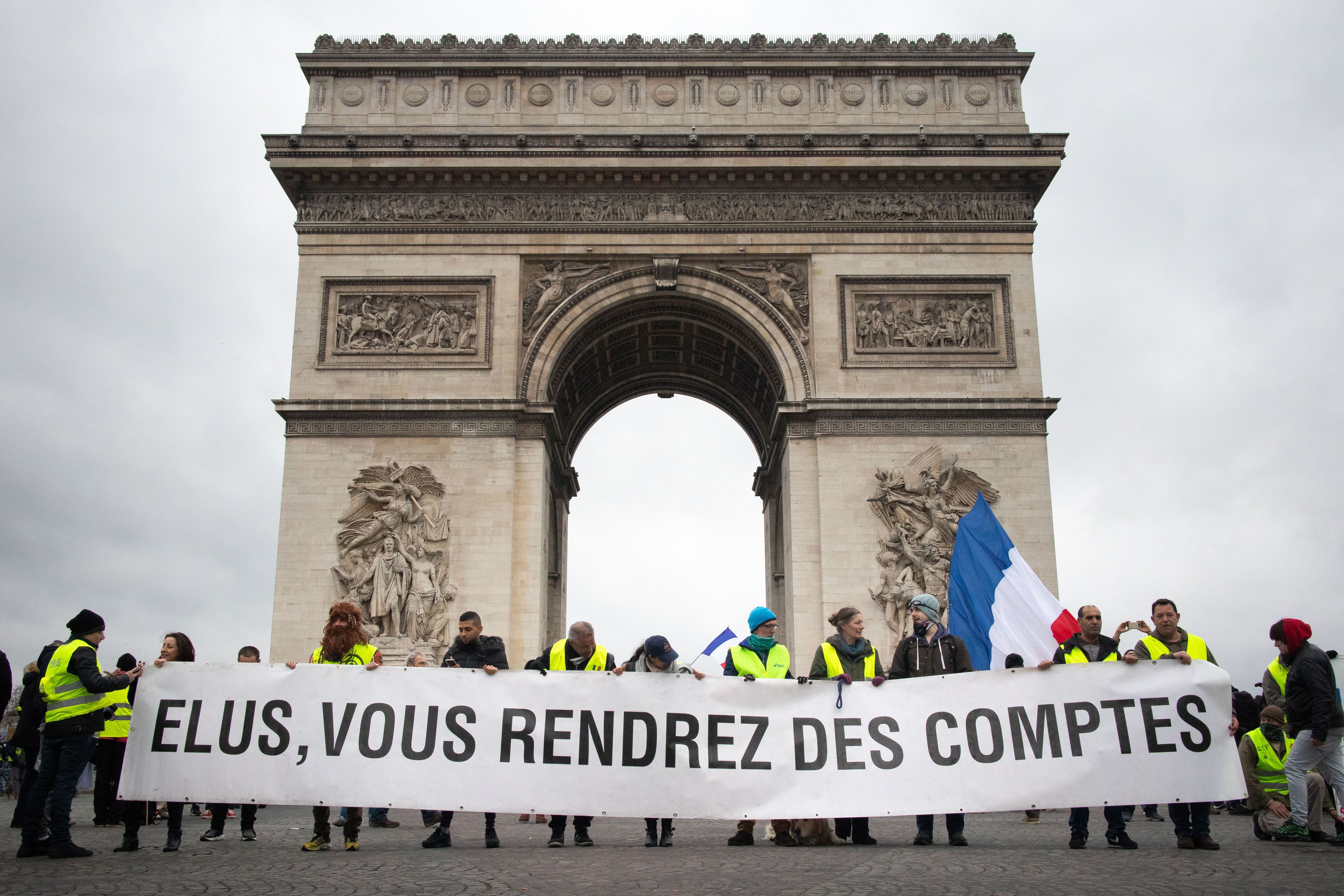 Place de l'Etoile, le 12/01/2019